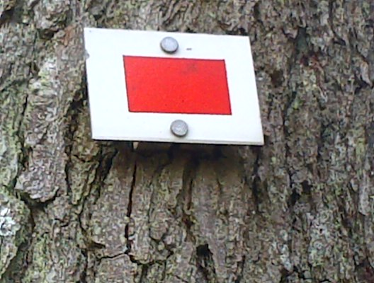 Col de Saverne - Randonnée Club Vosgien